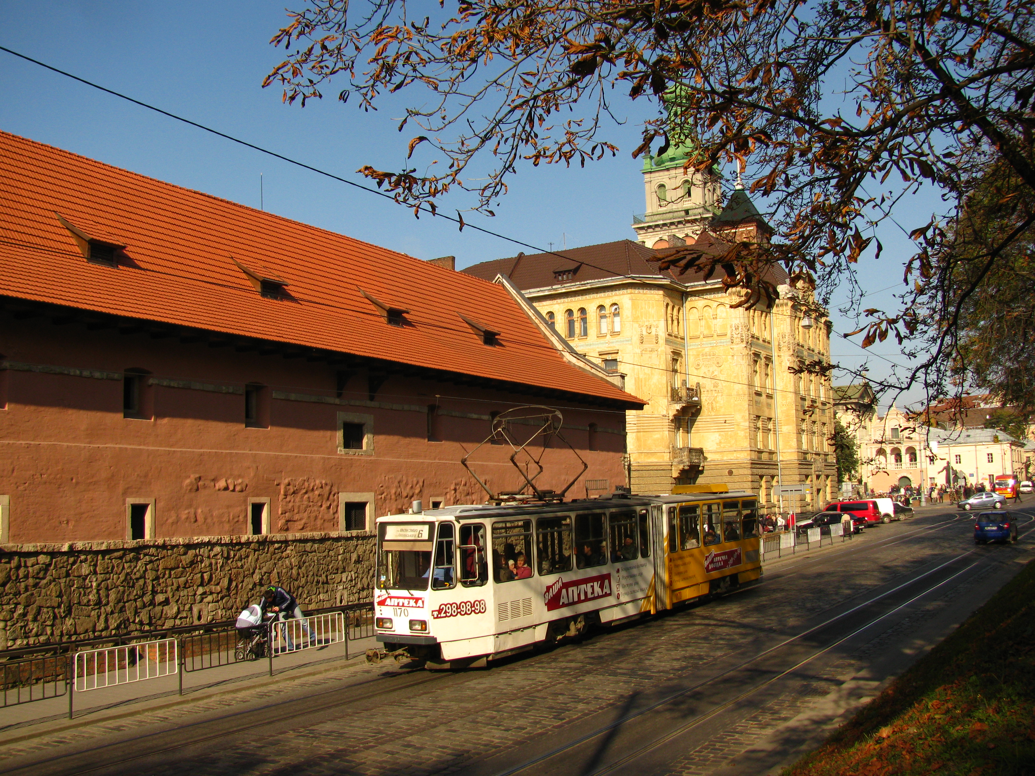 вулиця Підвальна у Львові